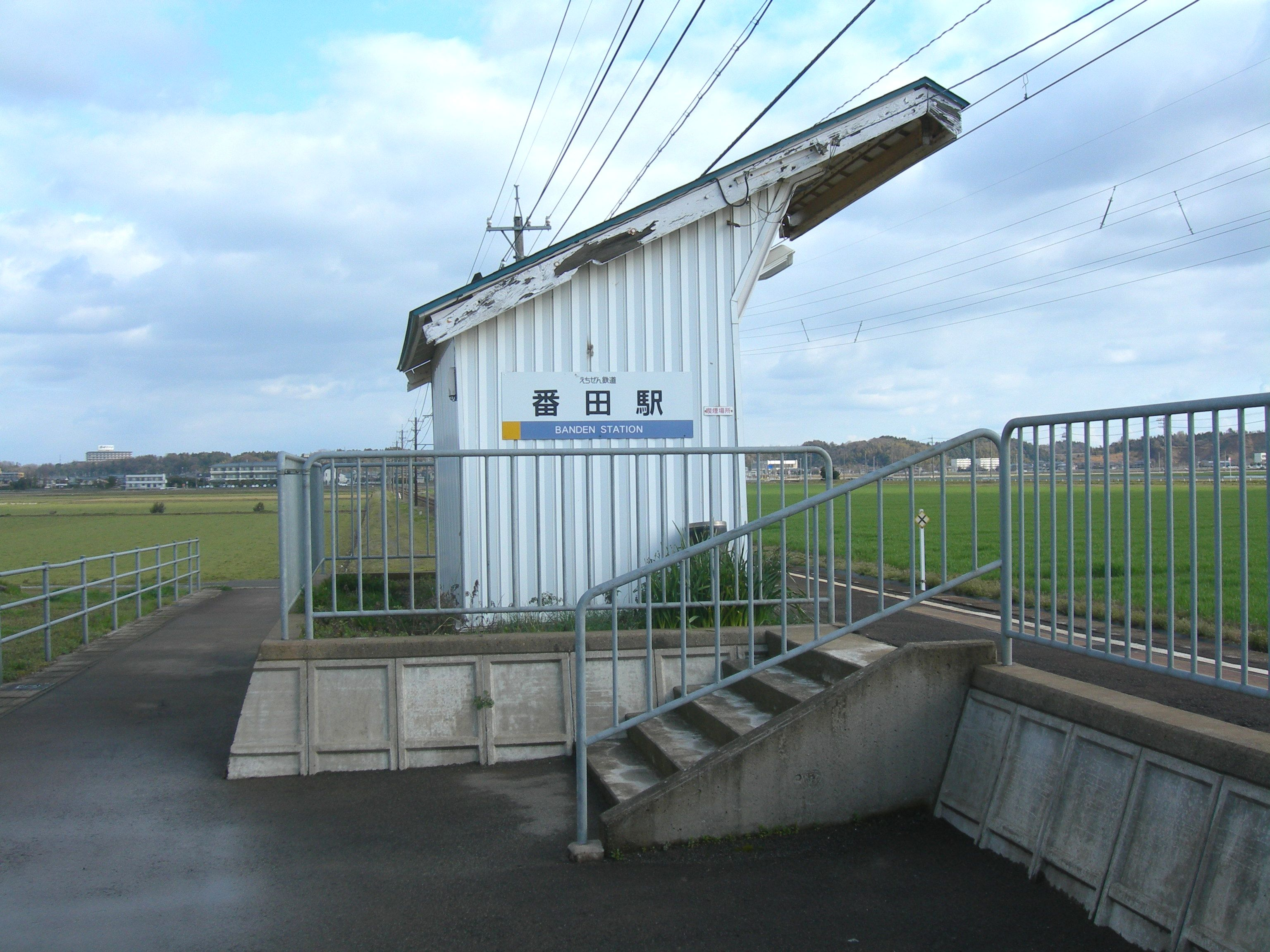 番田駅ホーム